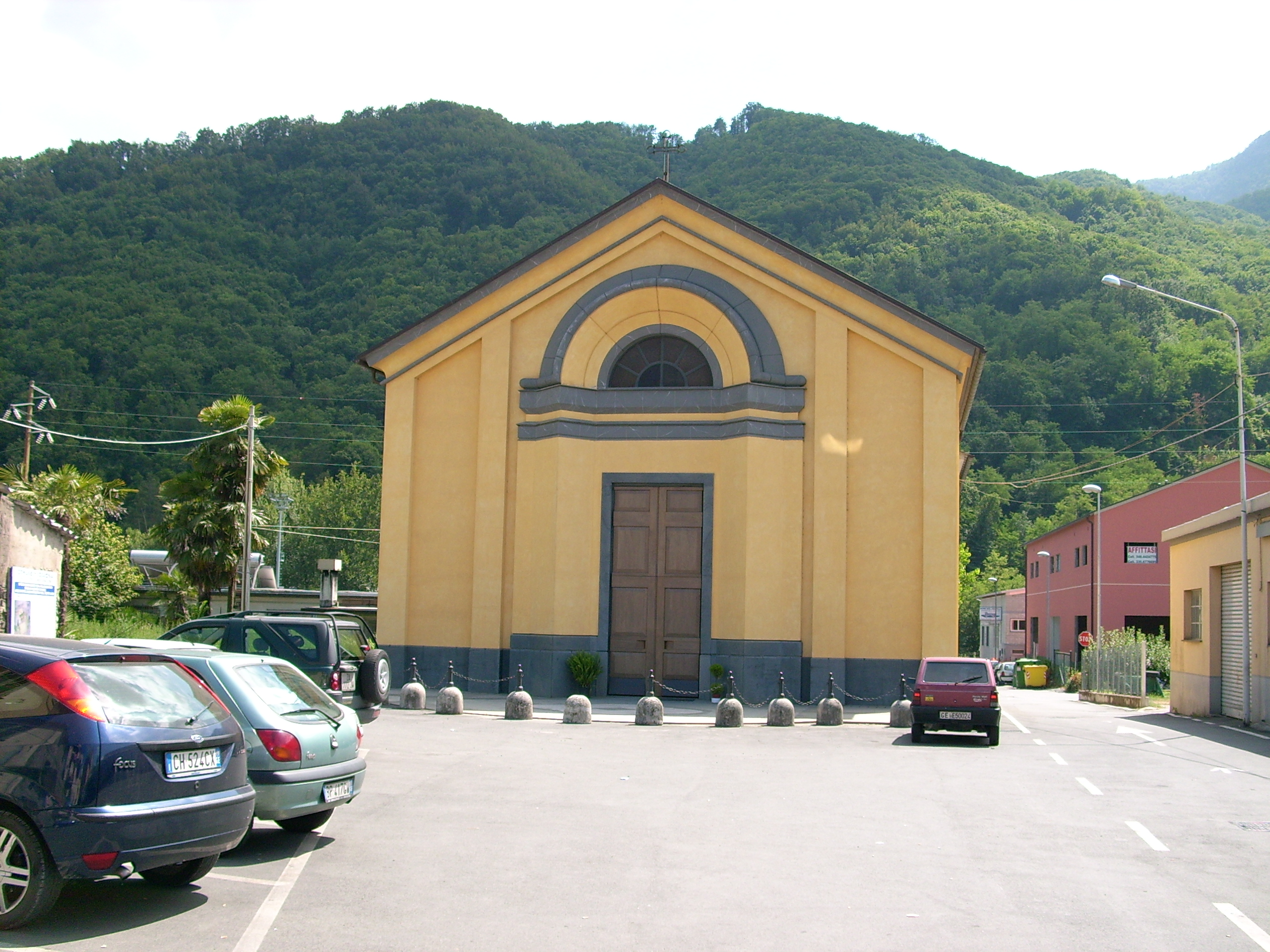 Chiesa di Nostra Signora degli Angeli presso Monleone di Cicagna, Liguria, Italia